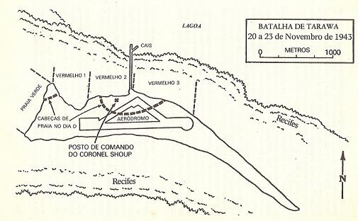 Tarawa Map Defense